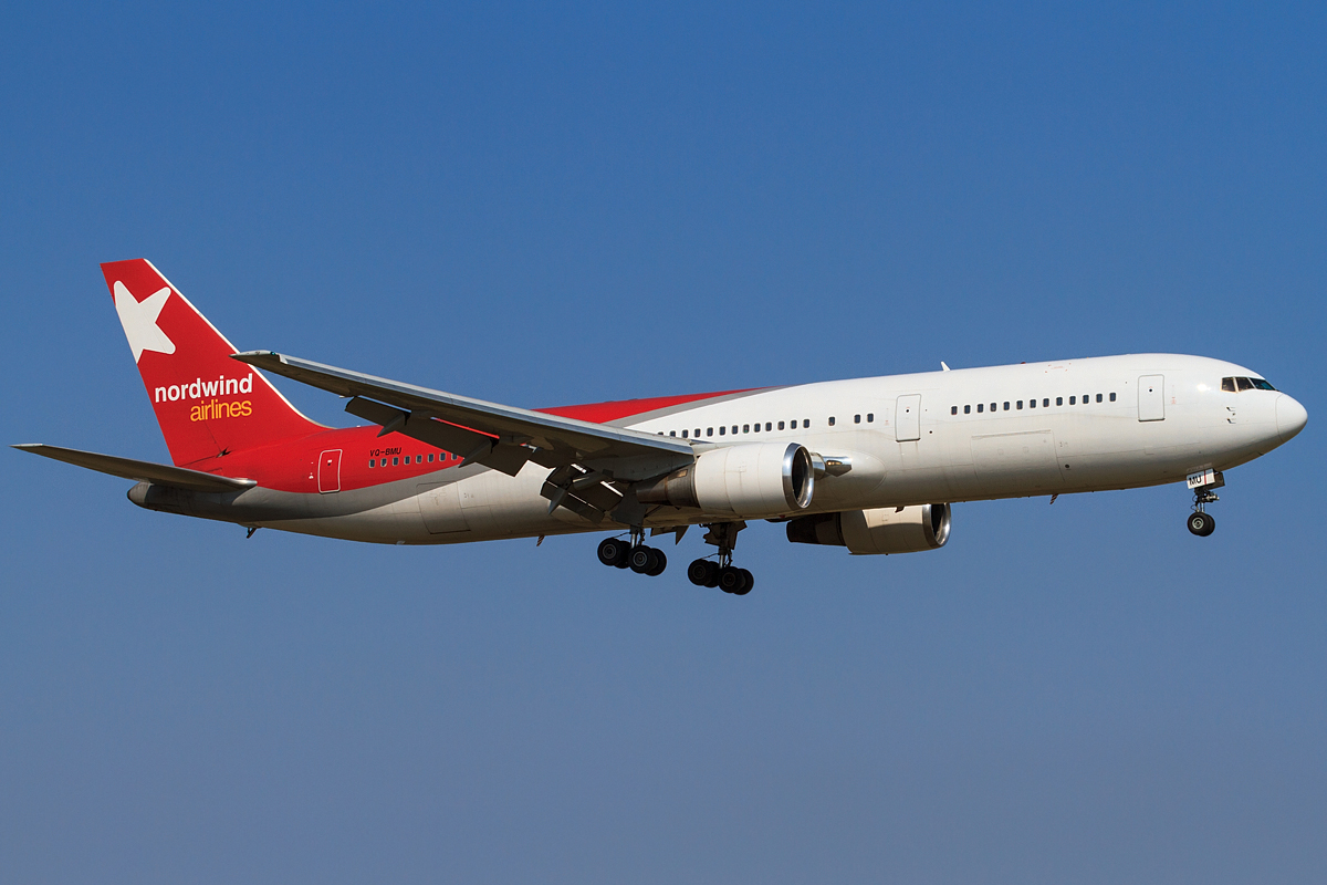 Boeing 767-300ER Nordwind Airlines VQ-BMU